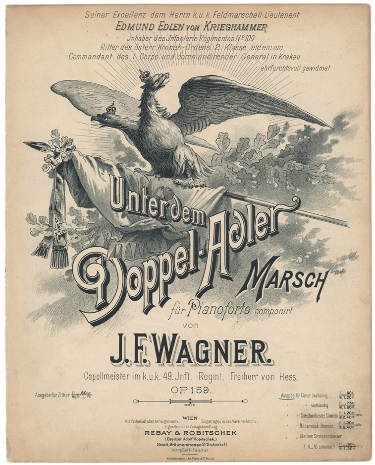 Josef Franz Wagner (1856–1908): Unter dem Doppel-Adler. Marsch op 159, Titelblatt; Musikverlag Rebay & Robitschek, Wien